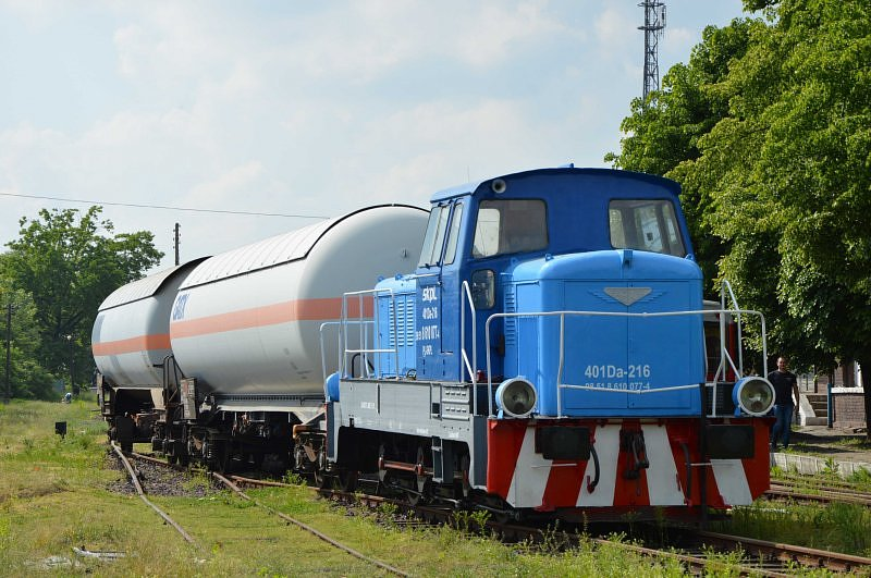 Spalinowa lokomotywa manewrowa 401Da-216 należąca do Stowarzyszenia Kolejowych Przewozów Lokalnych ciągnie skład wagonów cystern w Pleszewie.